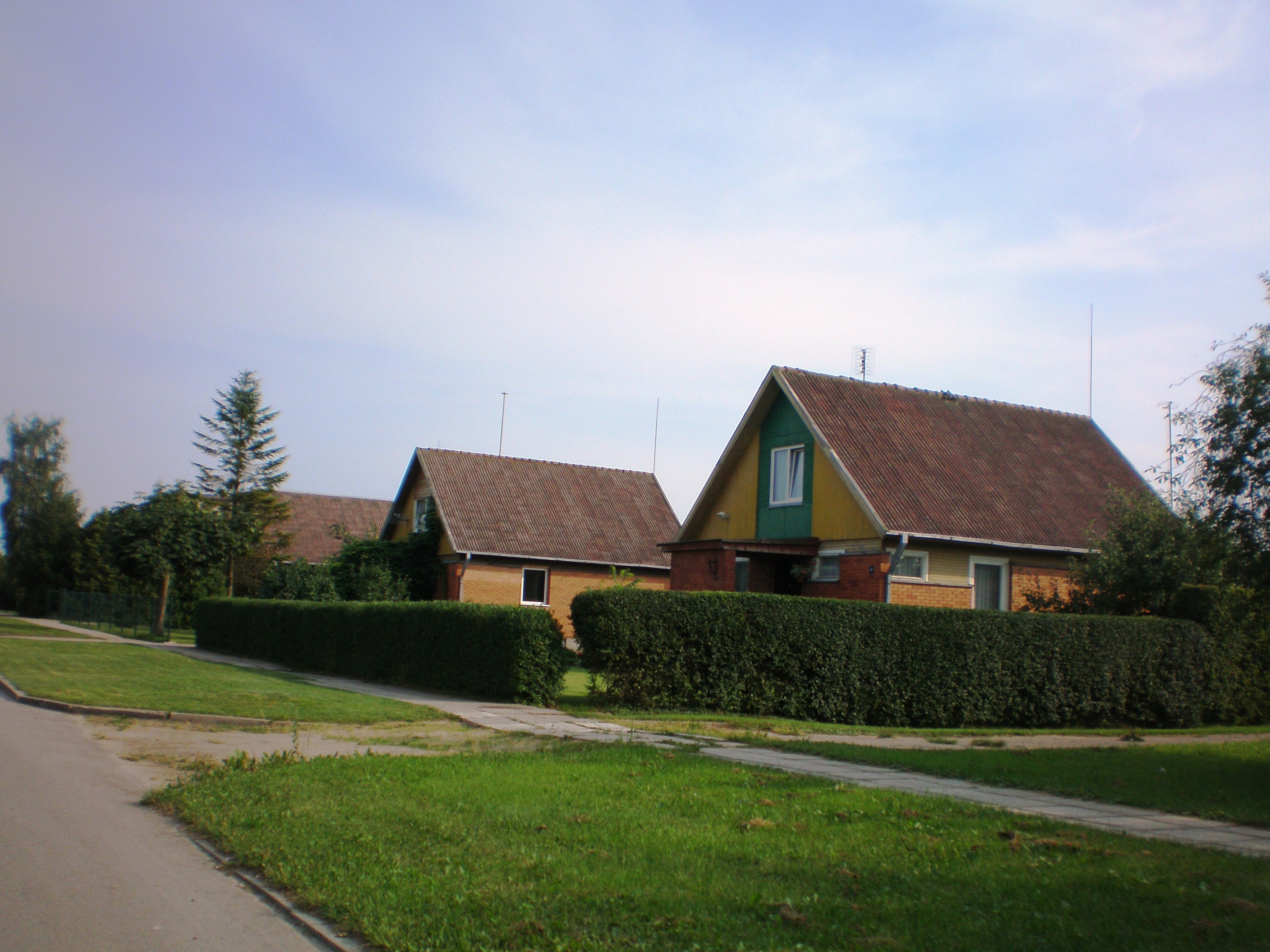 Localidad Labūnava en Municipio de Kėdainiai, Lituania